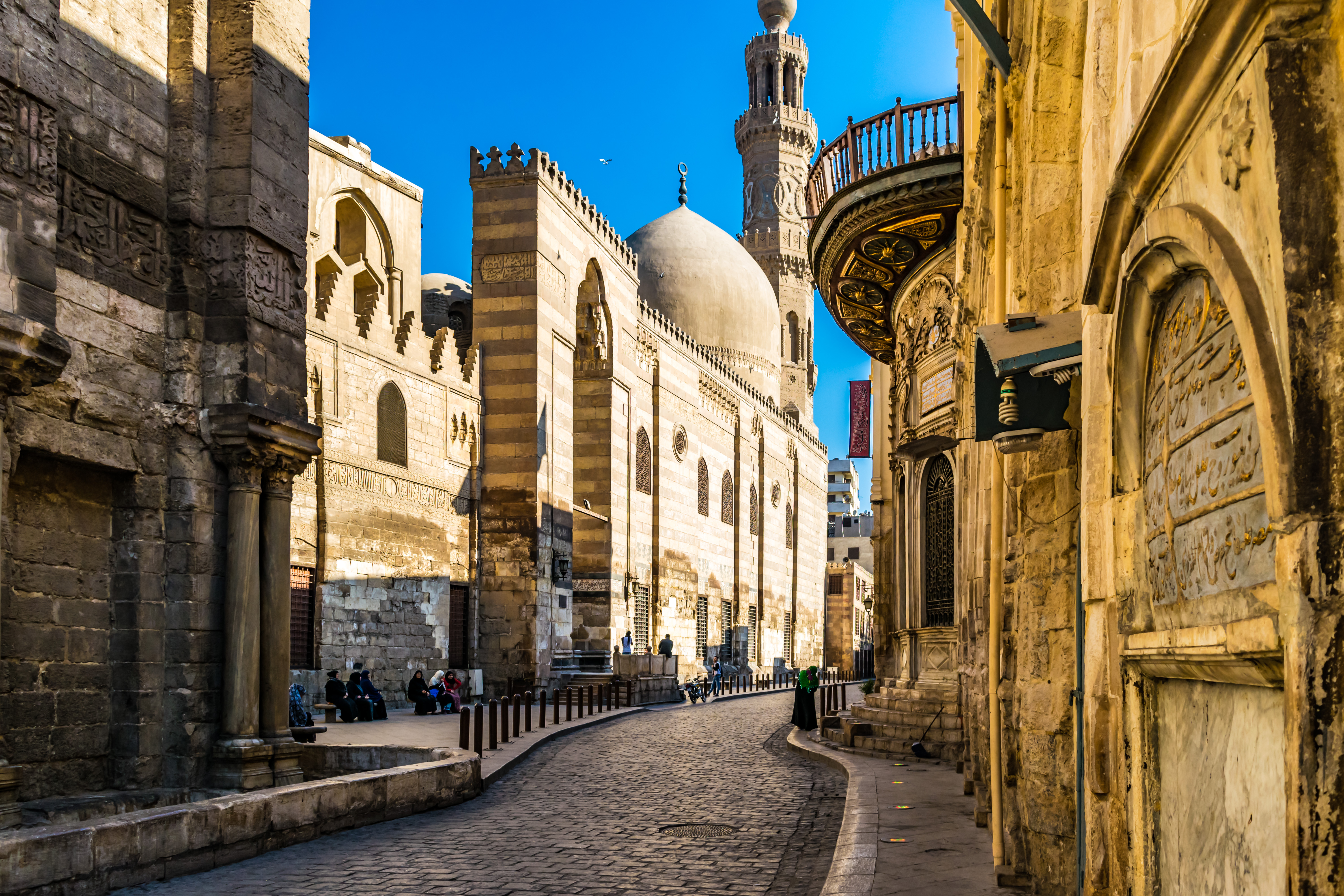 شارع المعز لدين الله الفاطمى